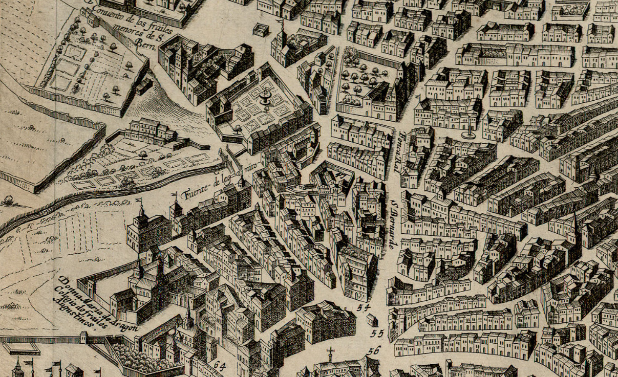 Detalle de la plancha izquierda de 'La Villa de Madrid Corte de los Reyes Católicos de Espanna'; se aprobó su impresión en septiembre de 1622 y se realizó en 1623. El plano, «dibujado en perspectiva caballera», en la reedición del grabador holandés Frederic de Witt, hacia 1635.(Mapa de Antonio Mancelli 1622-1635 del original digitalizado por la Biblioteca nacional de España)